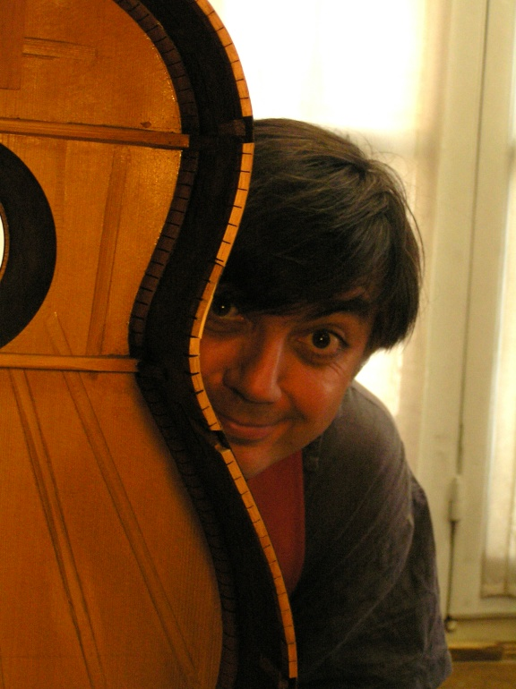 Lorenzo Frignani beim Restaurieren einer Gitarre von Manuel Ramirez